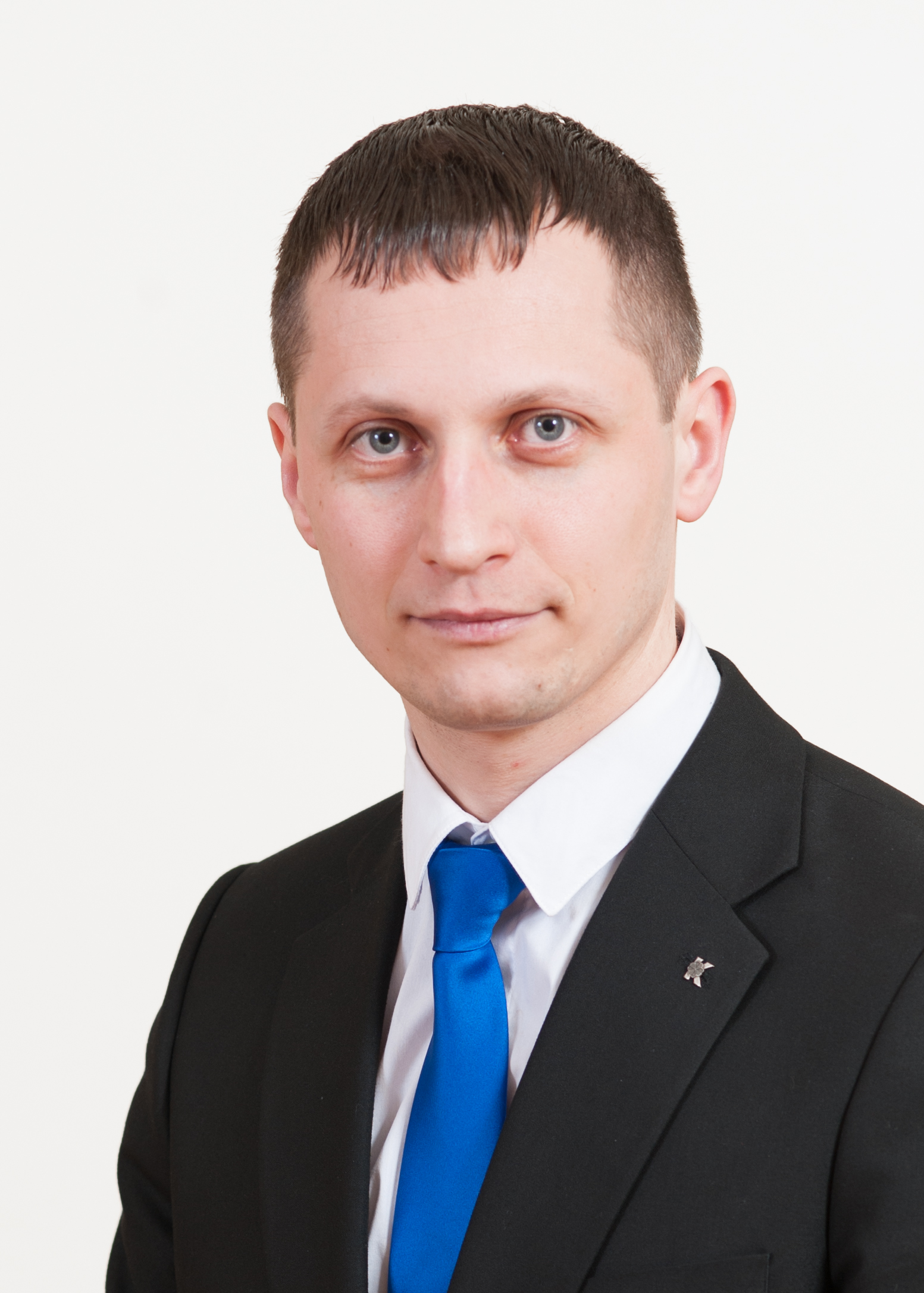 Dmitri Dmitrijev